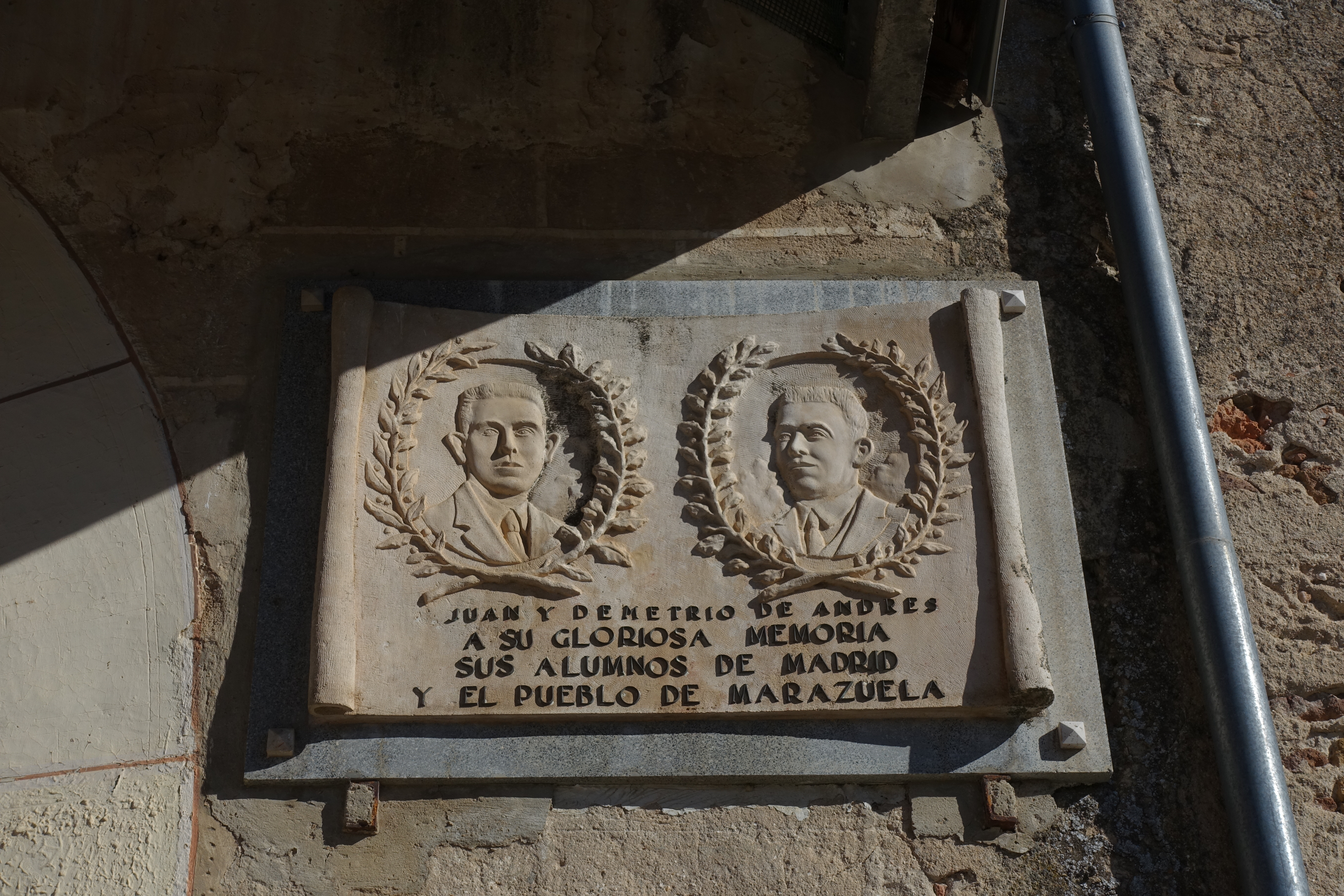 Iglesia de la Asunción, Marazuela (Segovia, España).